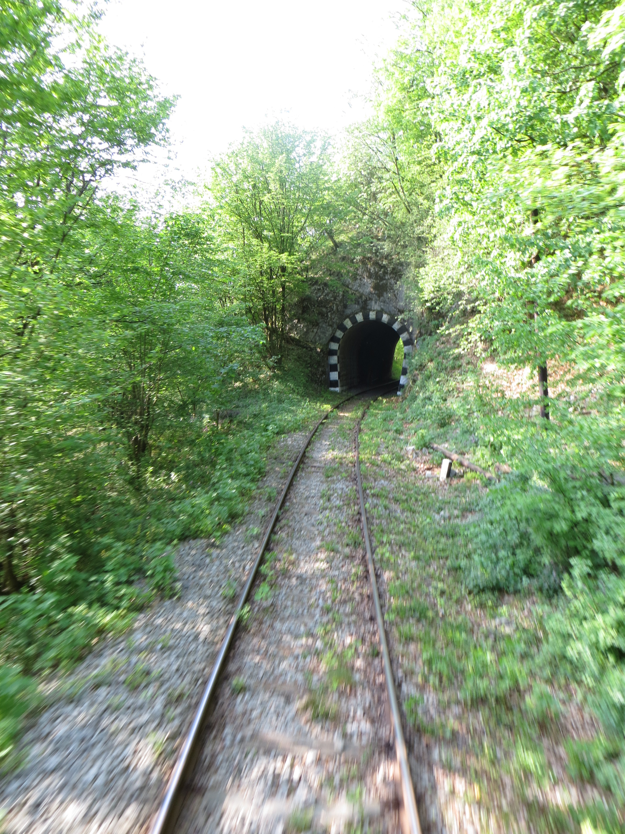 Porțiunea de cale ferată Oravița-Anina - 33,4 km: 02